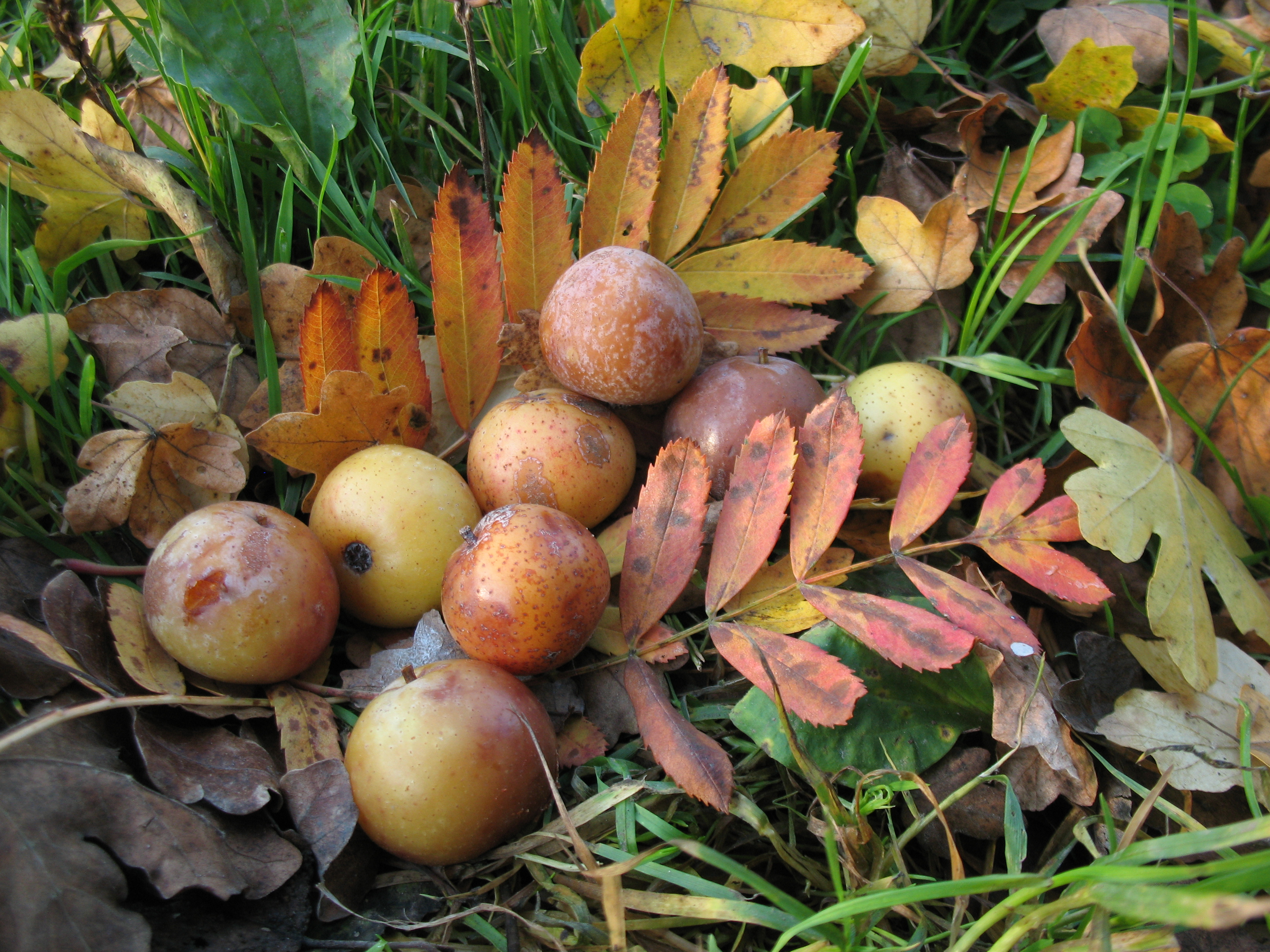 Sorbus domestica (fruits)